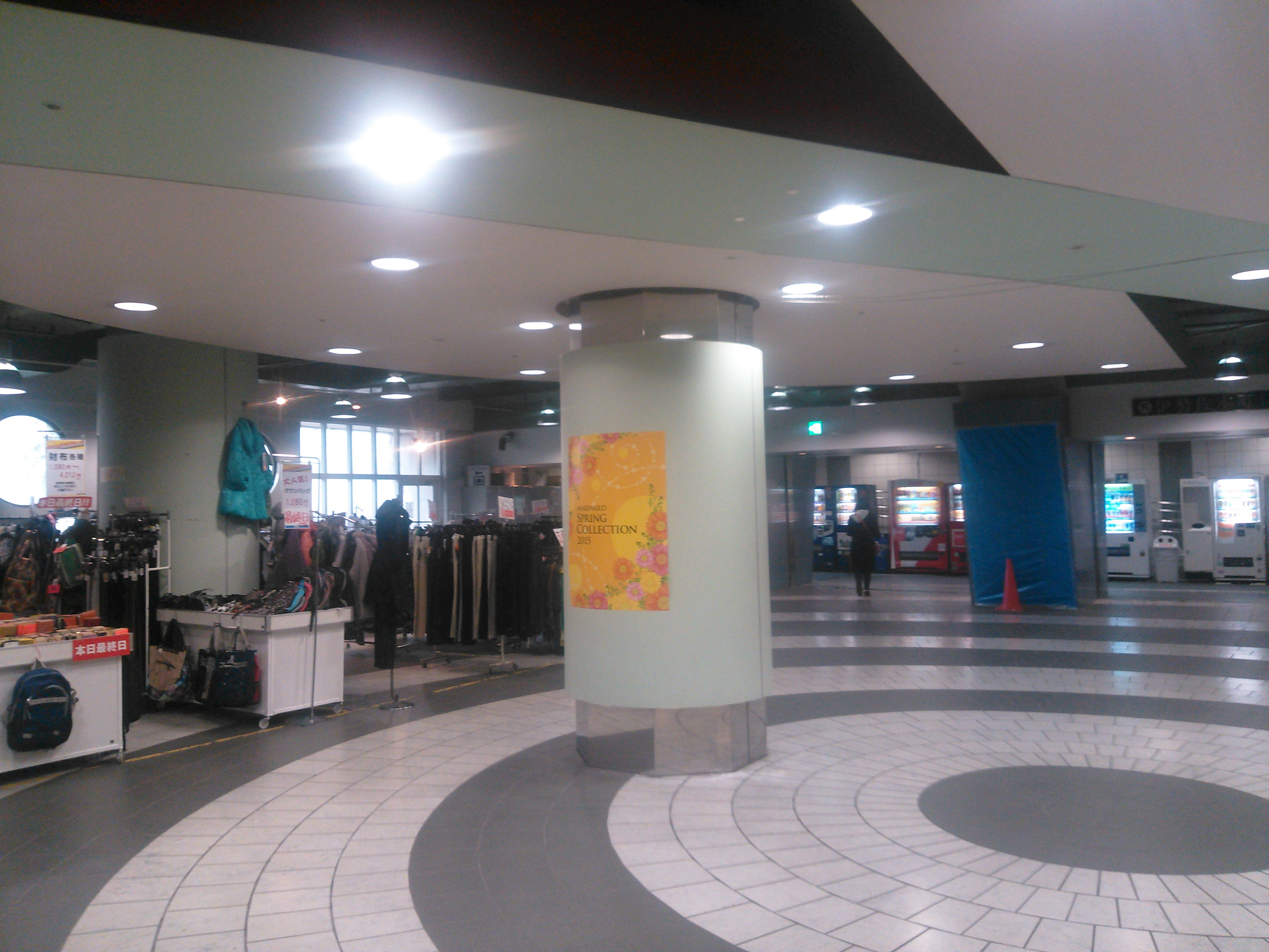 横浜市中区、マリナード地下街の広場。吉田橋の地下部分にあたる